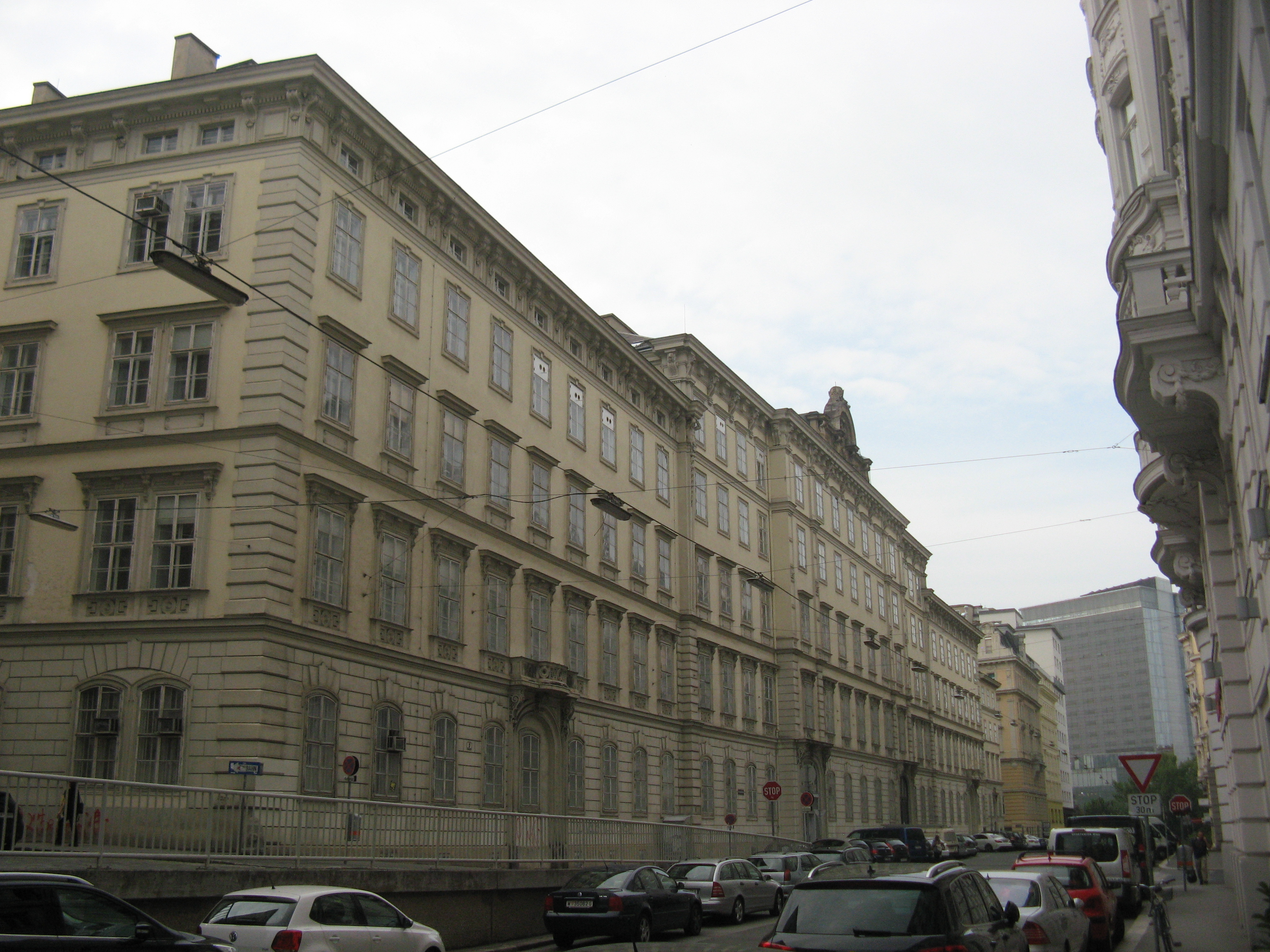 Dominikanerbastei, Wien-Innere Stadt